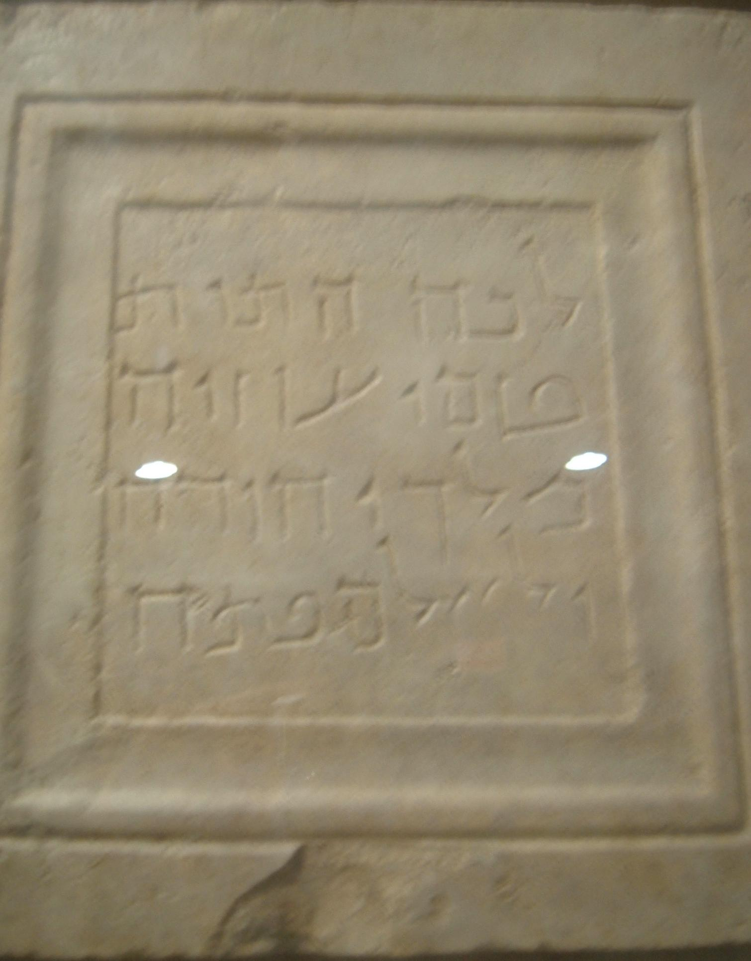 העתק (גבס, נדמה לי) של ציון עוזיה. נמצא במאה ה-19 באוסף של כנסייה רוסית בארץ. לא ידוע מאין זה נלקח במקור.